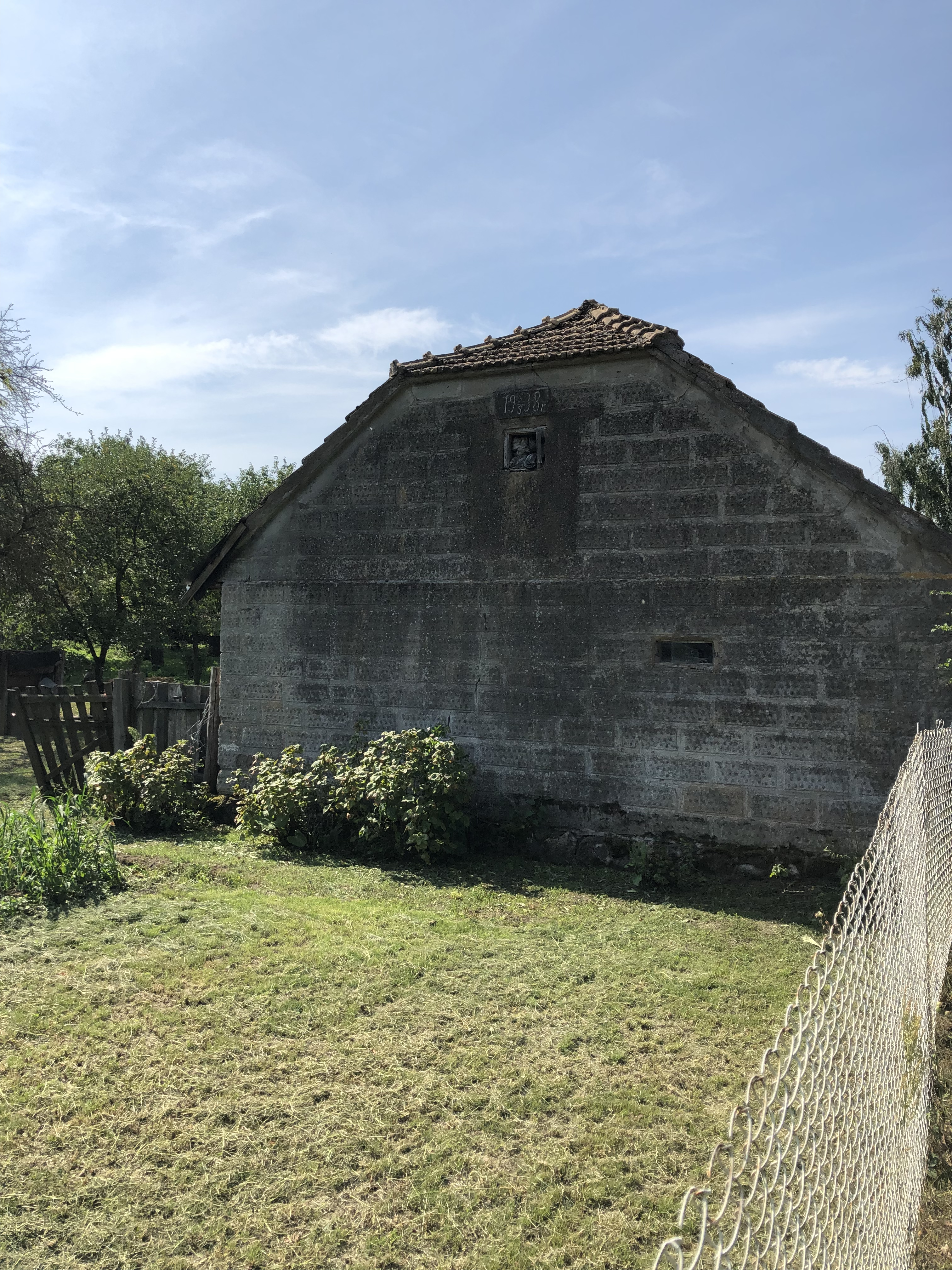 Гаспадарчая пабудова 1938 году ў вёсцы Новікі Квасоўскага сельсавета Гродзенскай вобласці.